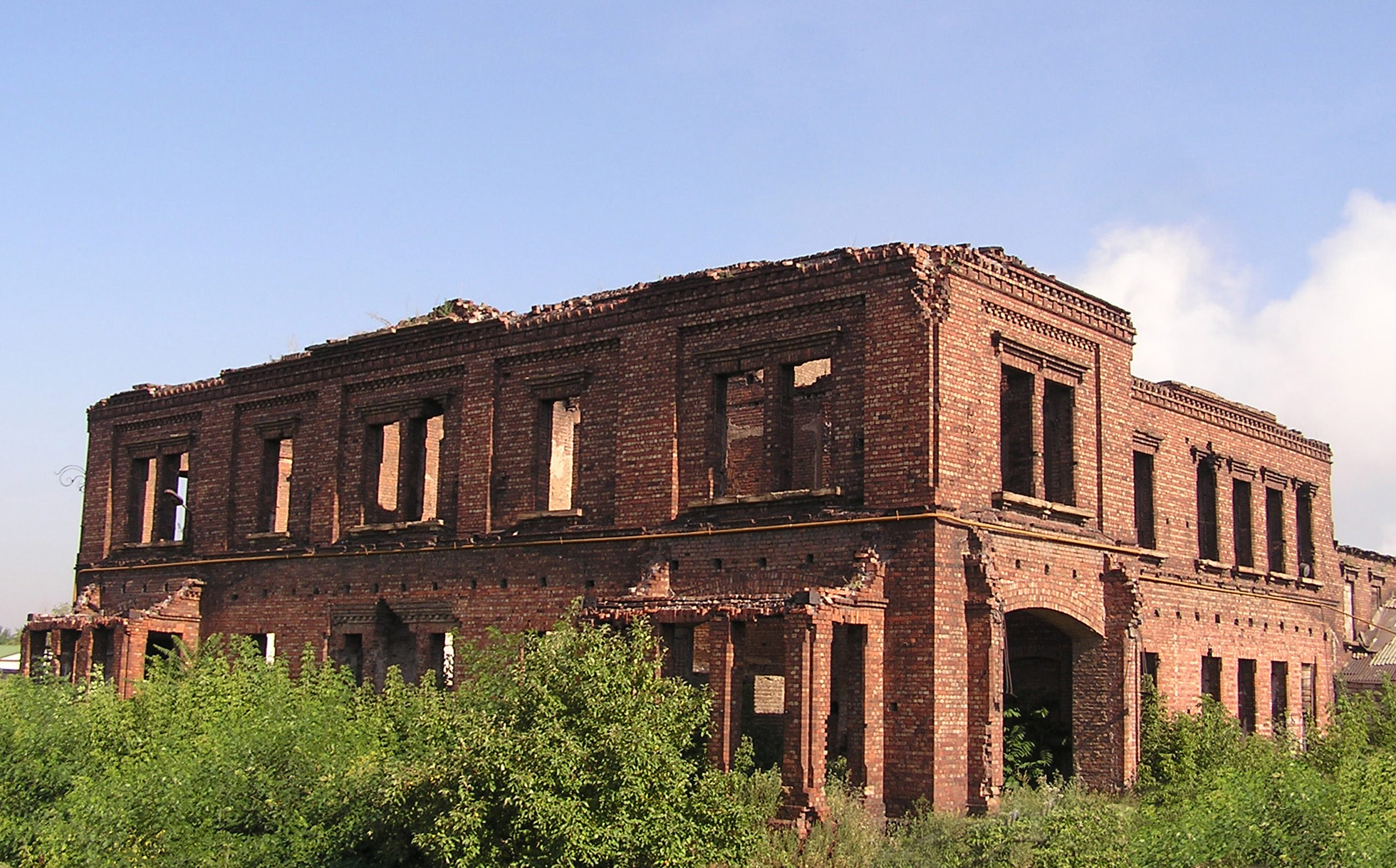 Дом Джона Юза в Донецке